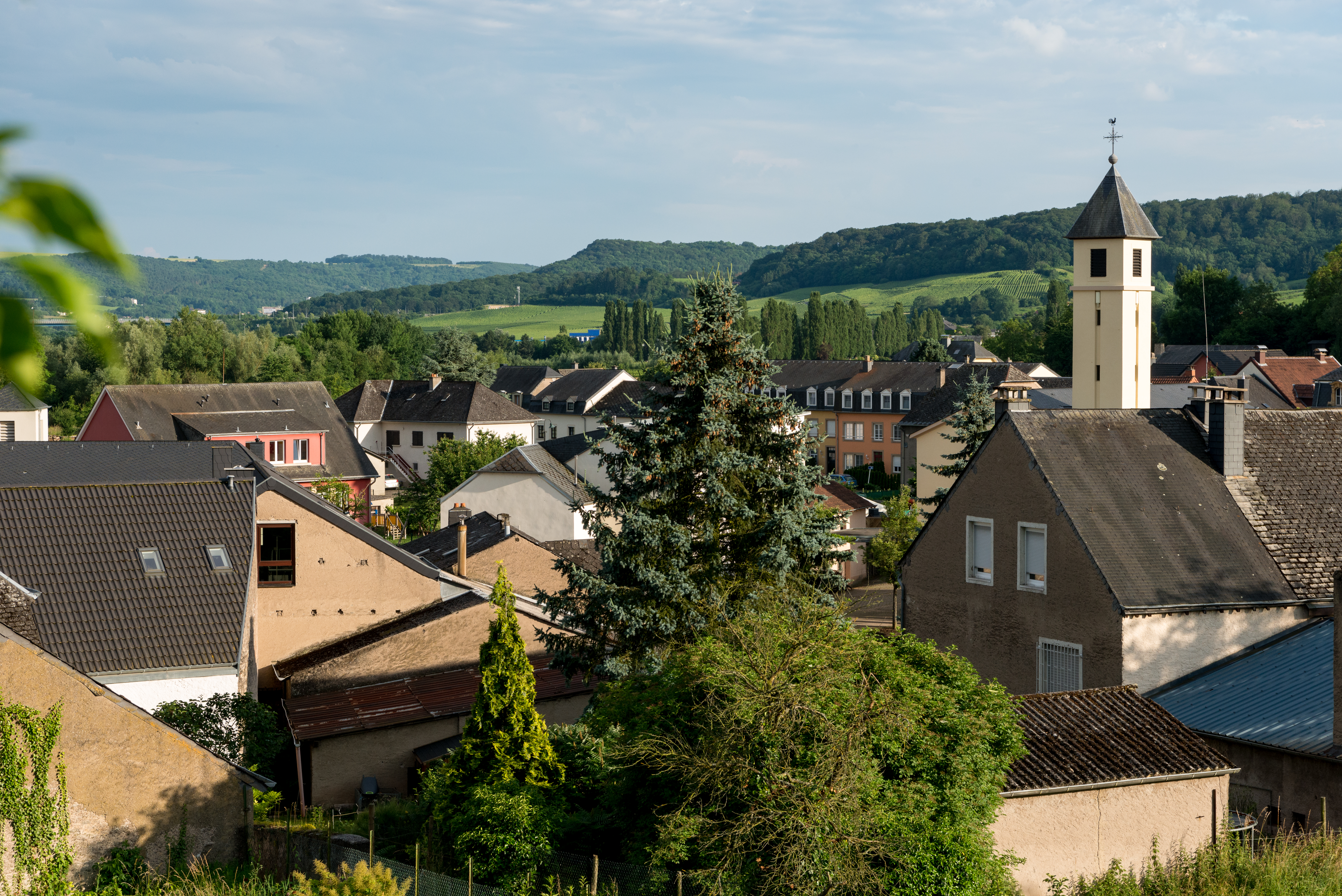 Vue op Wëntreng.